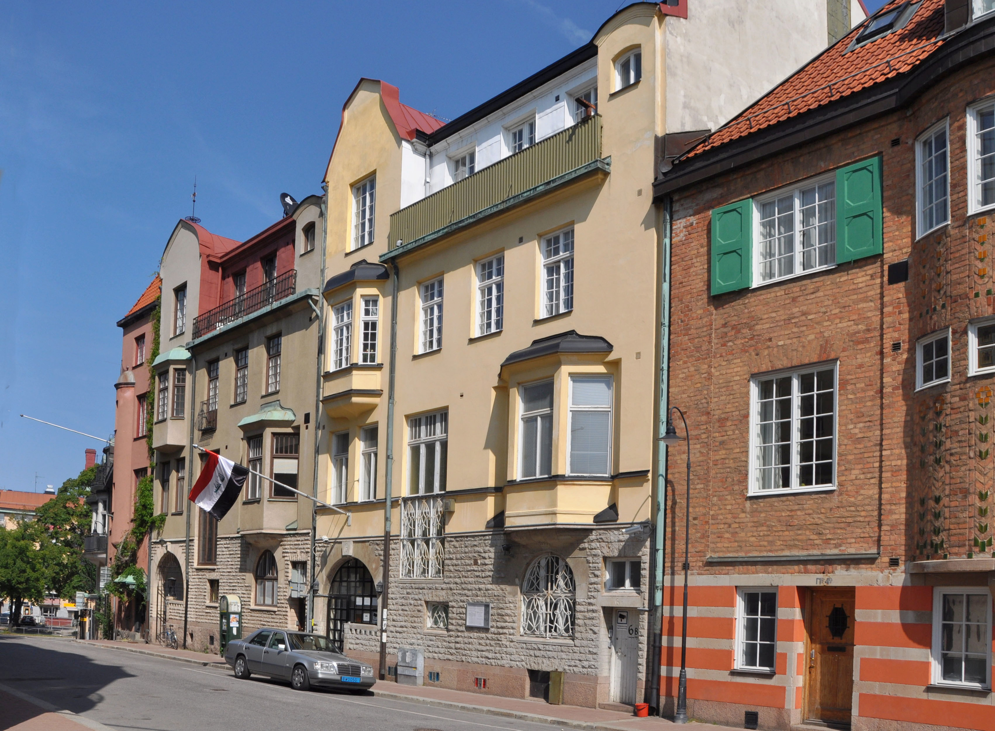 Baldersgatan, Stockholm. Från vänster; Baldersgatan 8 (Piplärkan 4): Byggnadsår 1909-10, arkitekt och byggmästare A D Larsson, byggherre J A Larsson. Baldersgatan 6 (Piplärkan 3): Byggnadsår 1909-10, arkitekt S D Larsson, byggherre C Carlsson, byggmästare J Persson. Baldersgatan 4 (Piplärkan 2): Byggnadsår 1909-10, arkitekt E Lallerstedt, byggherre W Böker, byggmästare F Dahl.